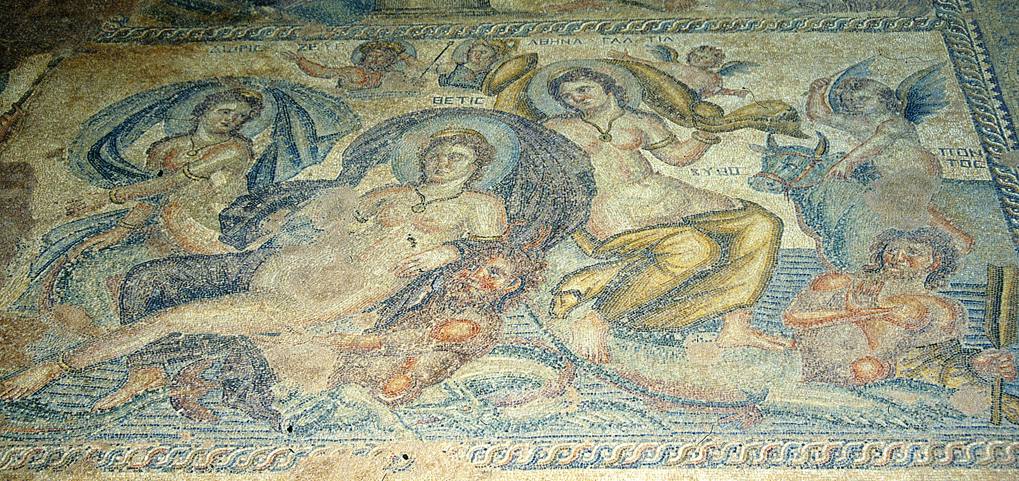 Paphos, Haus des Aion: Cassiopeia und die Nereiden